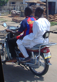 Okada in Kano, Nigeria